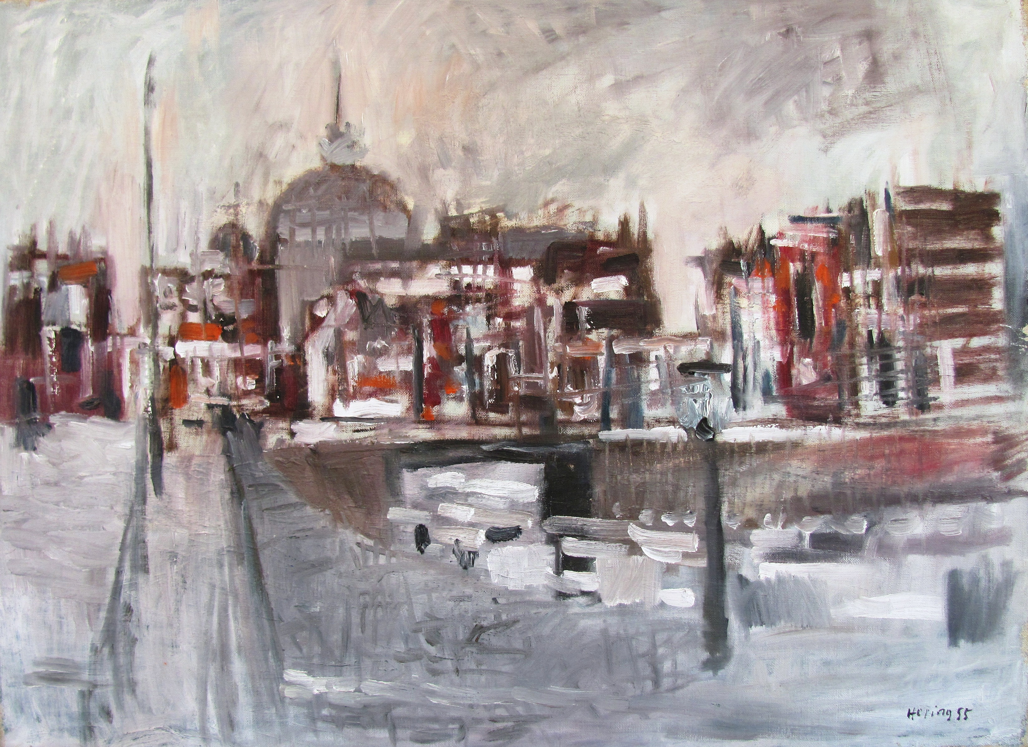 Gemälde "Scheveningen" von Bernd Hering, 1955.